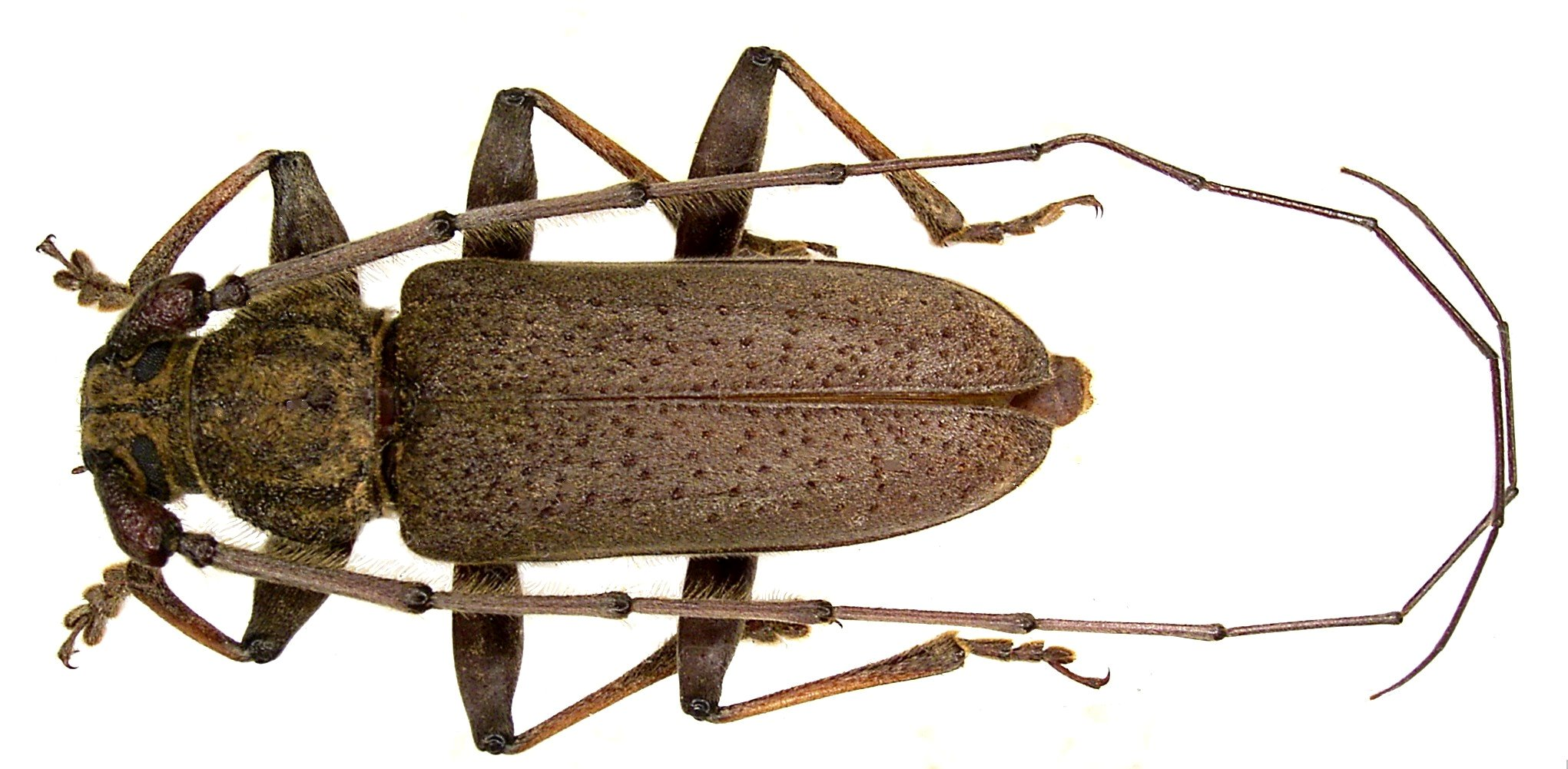 Familie: Cerambycidae Grösse: 28 mm Fundort: Vietnam, Yen Bai Provinz, An Fu Country leg. 1996; det. A.Weigel Foto: U.Schmdit, 2006